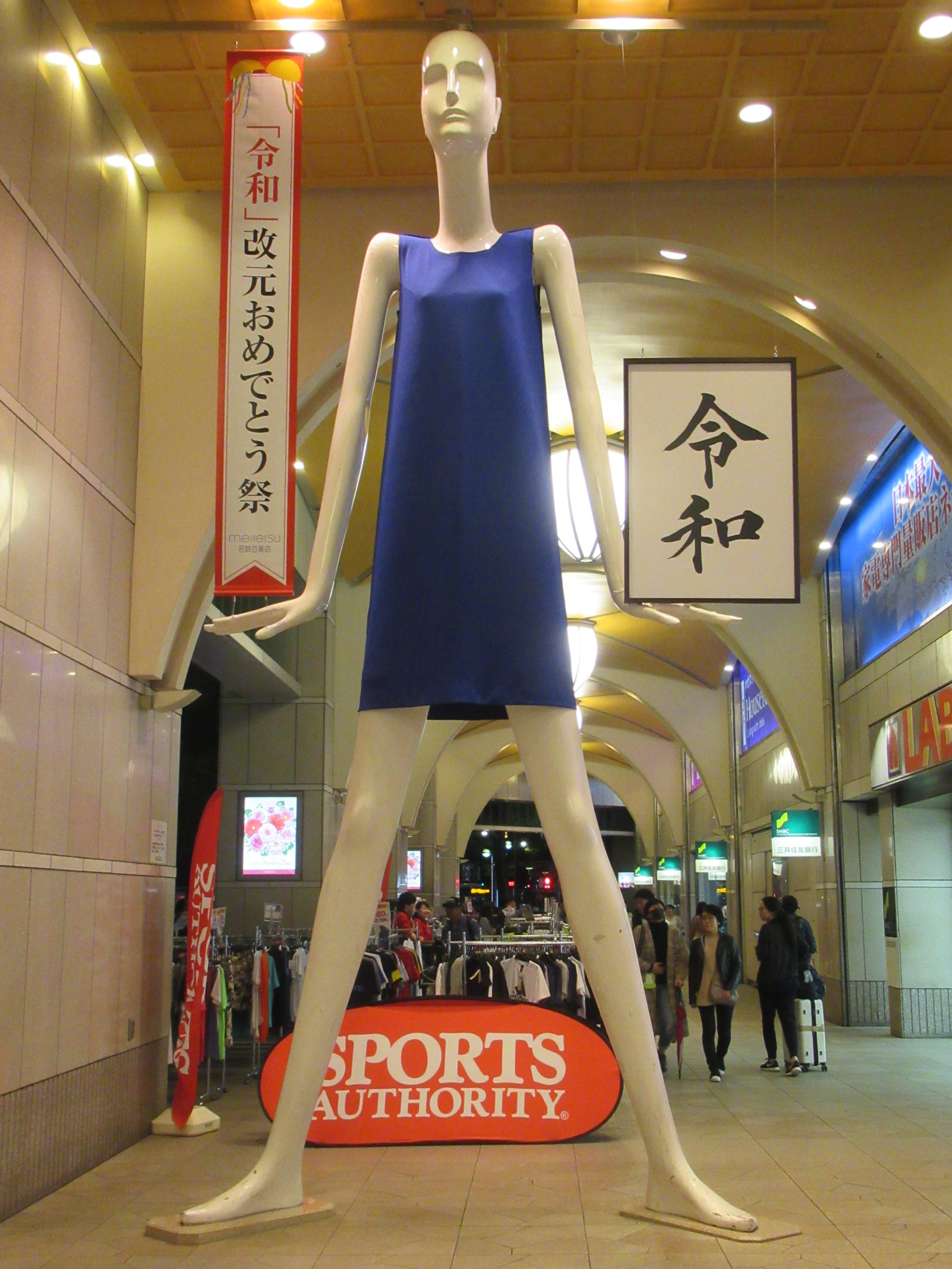 ナナちゃん人形 「令和」改元おめでとう